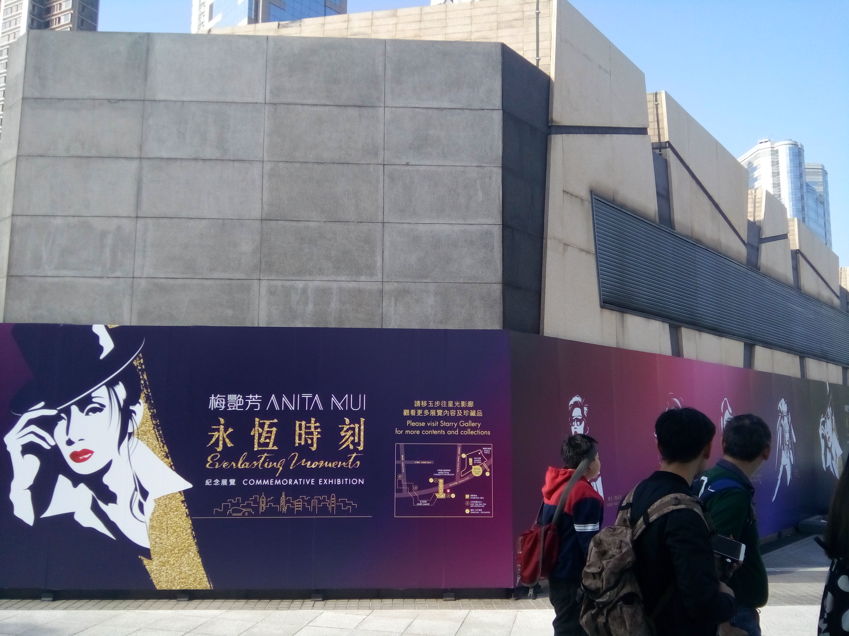 HK 尖東海濱平台 TST East Waterfront Podium 星光花園 Garden of Stars 梅艷芳 Anita Mui sign standing walking Dec 2016